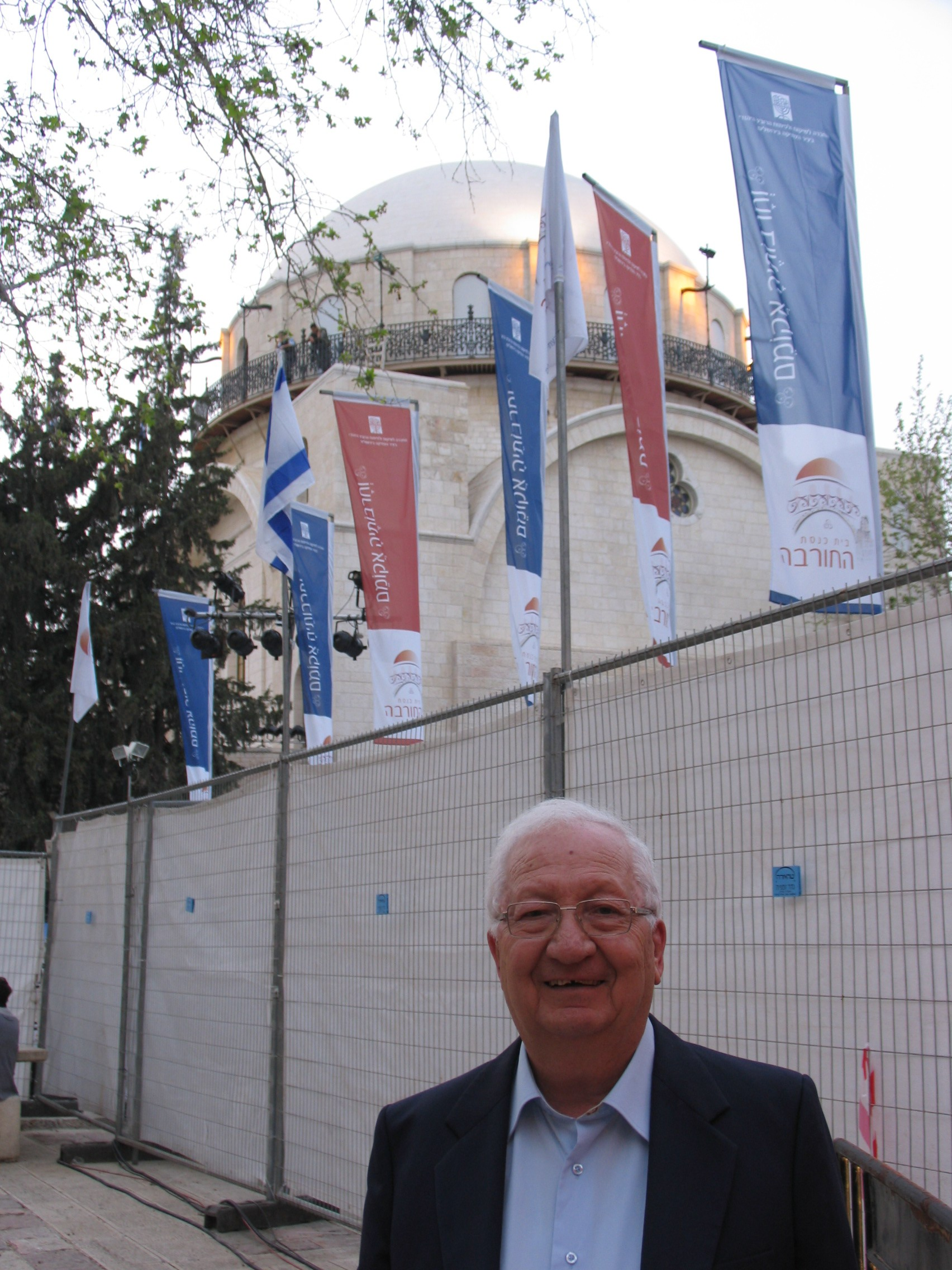 אריה מורגנשטרן. ברקע בית כנסת החורבה